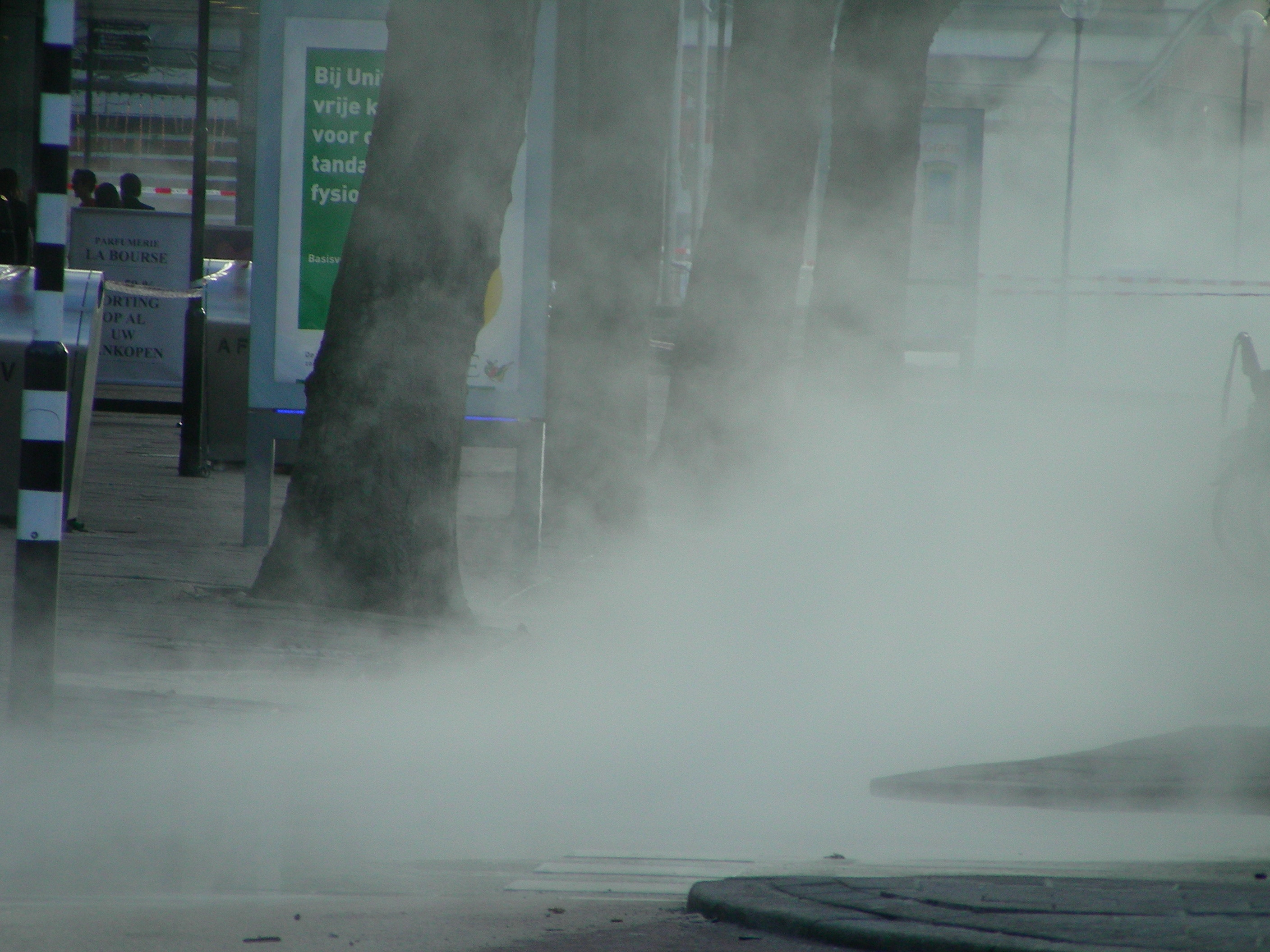 Stoomontwikkeling als gevolg van een gebroken buis van de stadsverwarming, Coolsingel.